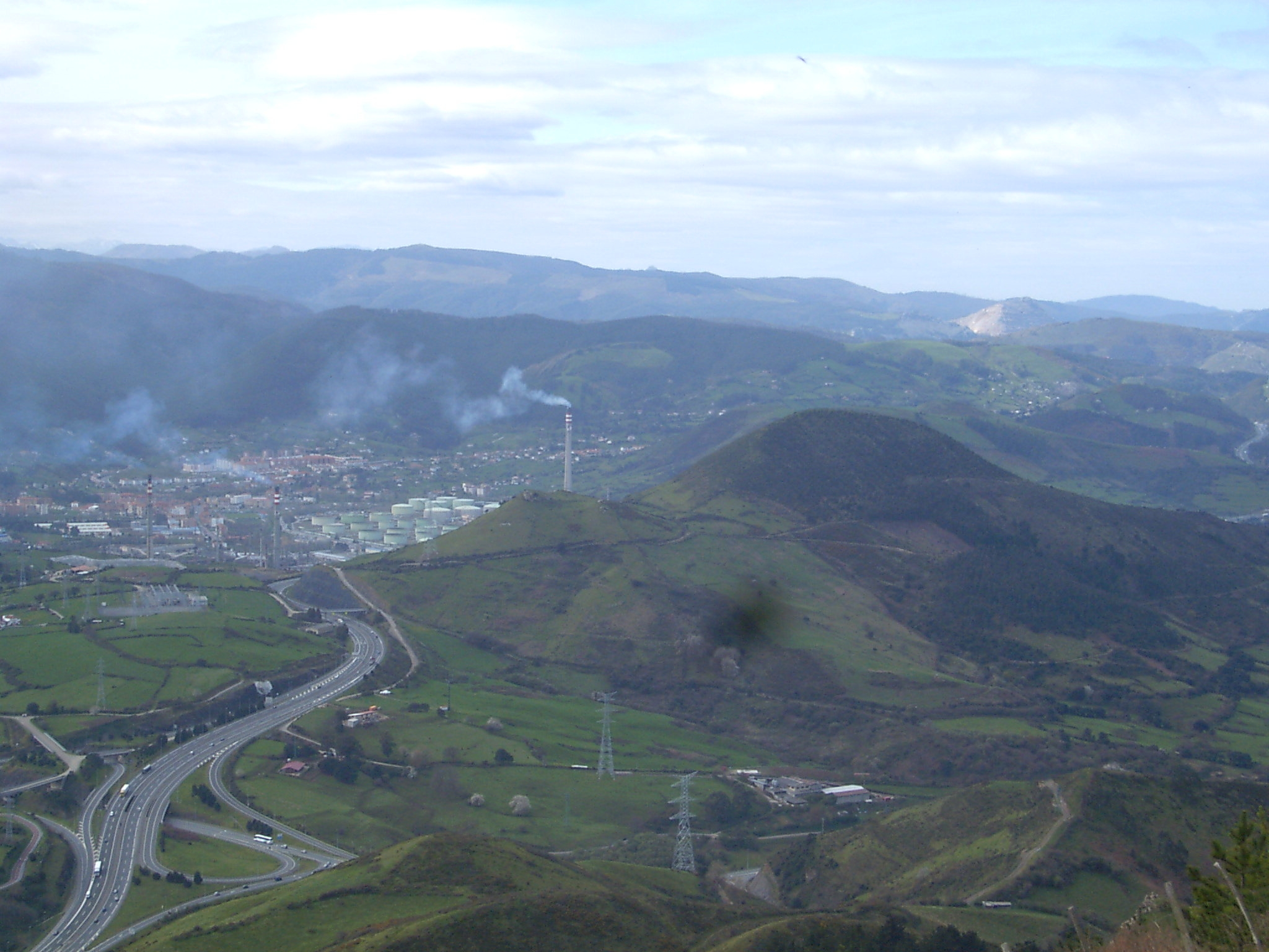 Montano mendiaren tontorra